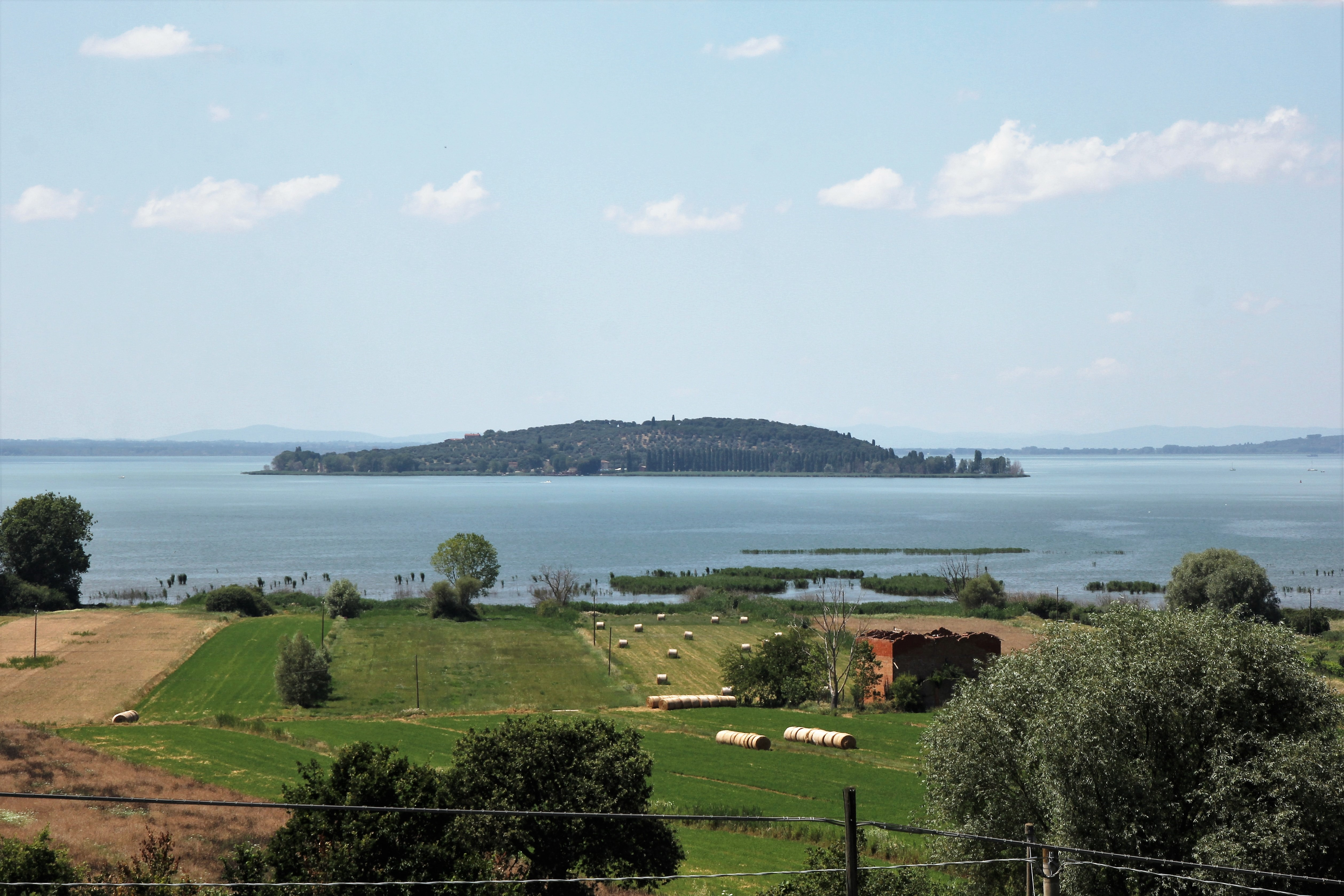 Lago Trasimeno, isola Polvese